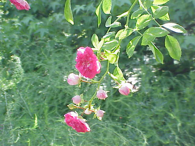 Species: Rosa sp. Family: Rosaceae Cultivar: Paul Ploton, Barbier 1910 Image No. 221